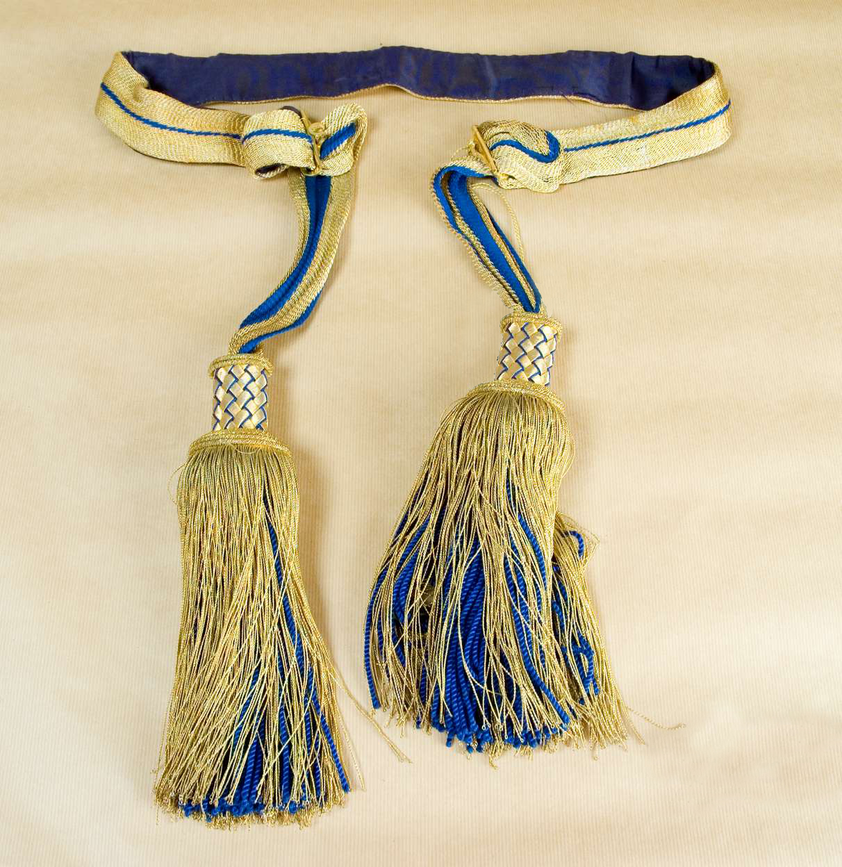 Skärp m1817